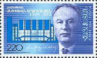 Почтовая марка Армении в память об академике АН СССР А. Арзуманяне